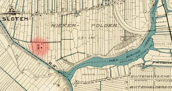 Detail van een kaart uit 1932 van het hoogheemraadschap Amstel, Gooi en Vecht, met daarop het Nieuwe Meer en de Riekerpolder. De Drinkwatervoorziening is in het rood geaccentueerd.